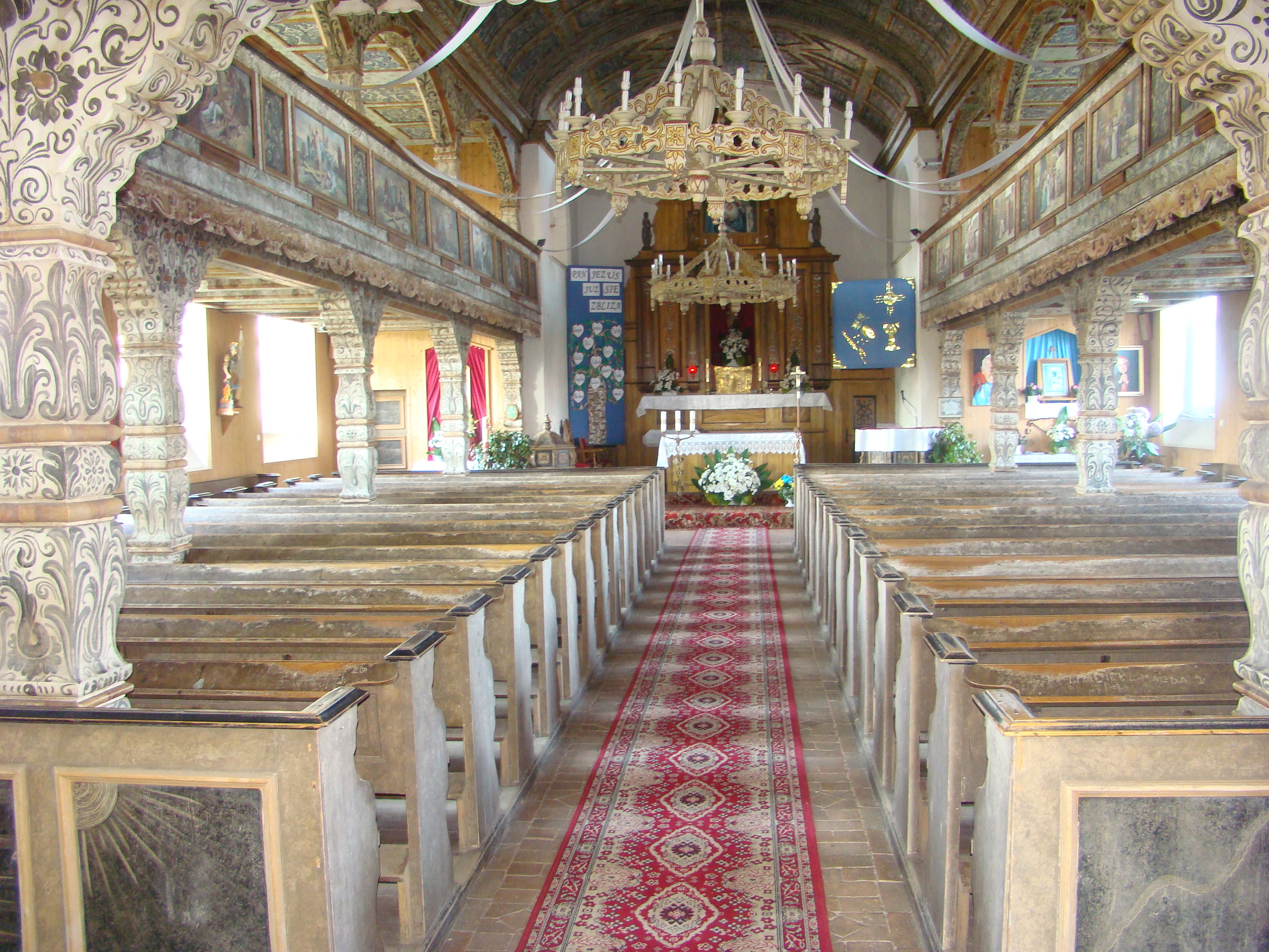 Okartowo